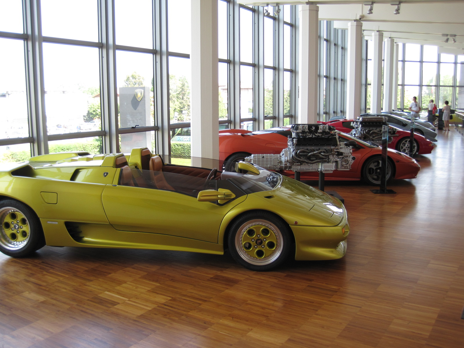 Musée Lamborghini